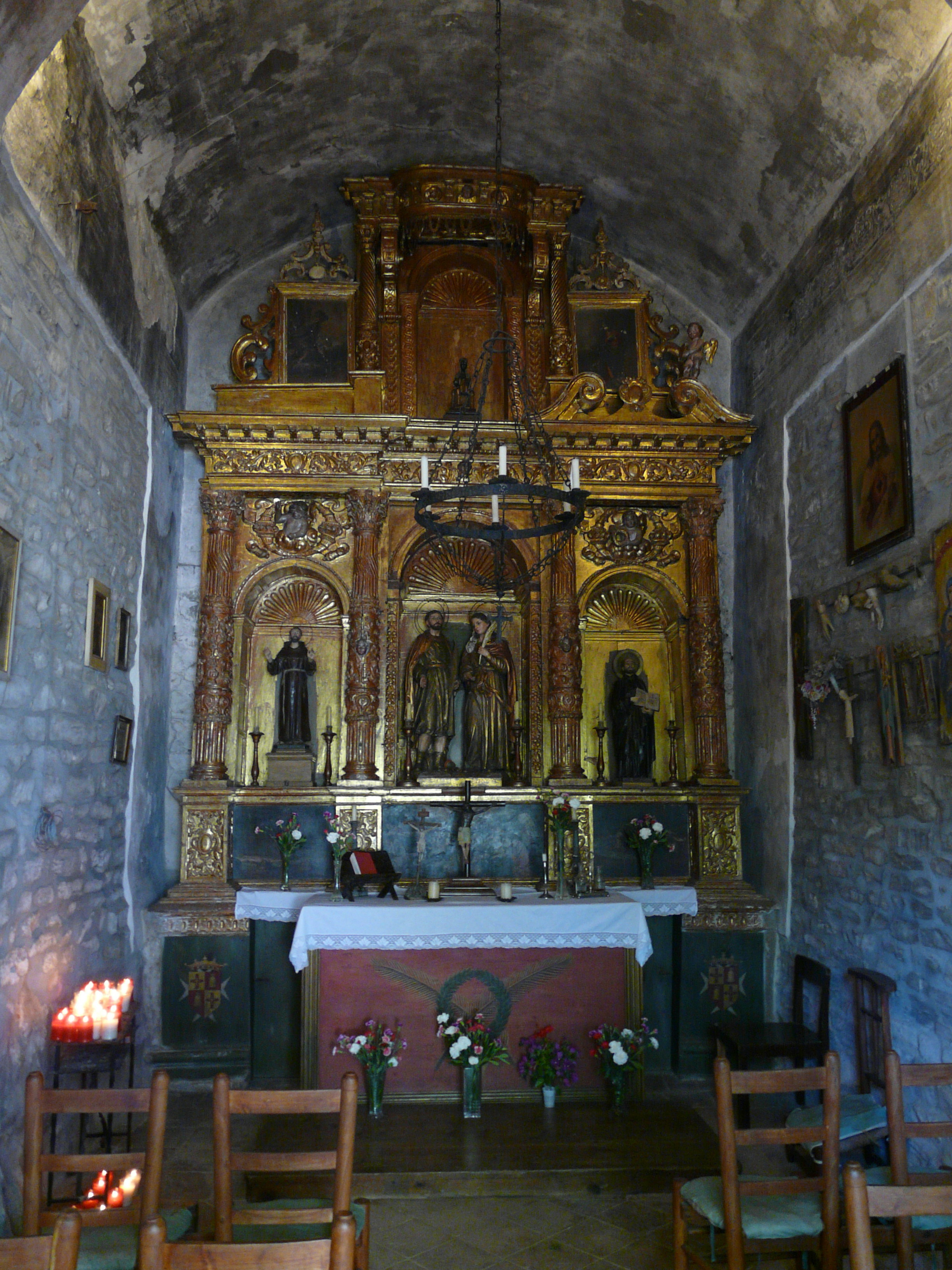 Ermita de Sant Cebrià, vista per dins. Segons explica el que vigila l'ermita, el retaule és original de cap al 1700, però les imatges no, ja que les van cremar quan la guerra. Sí que es mantenen les advocacions (sant Francesc a l'esquerra, sant Cebrià i santa Julita al mig, i sant Ignasi de Loiola a la dreta, excepte la de dalt, que no se sap quin sant hi havia i hi han posat una Moreneta que hi ve petita. A la banda de baix del retaule, als costats, hi ha els escuts dels marquesos d'Alfarràs (antics propietaris del parc del Laberint) que sembla que són encara els propietaris de l'ermita.